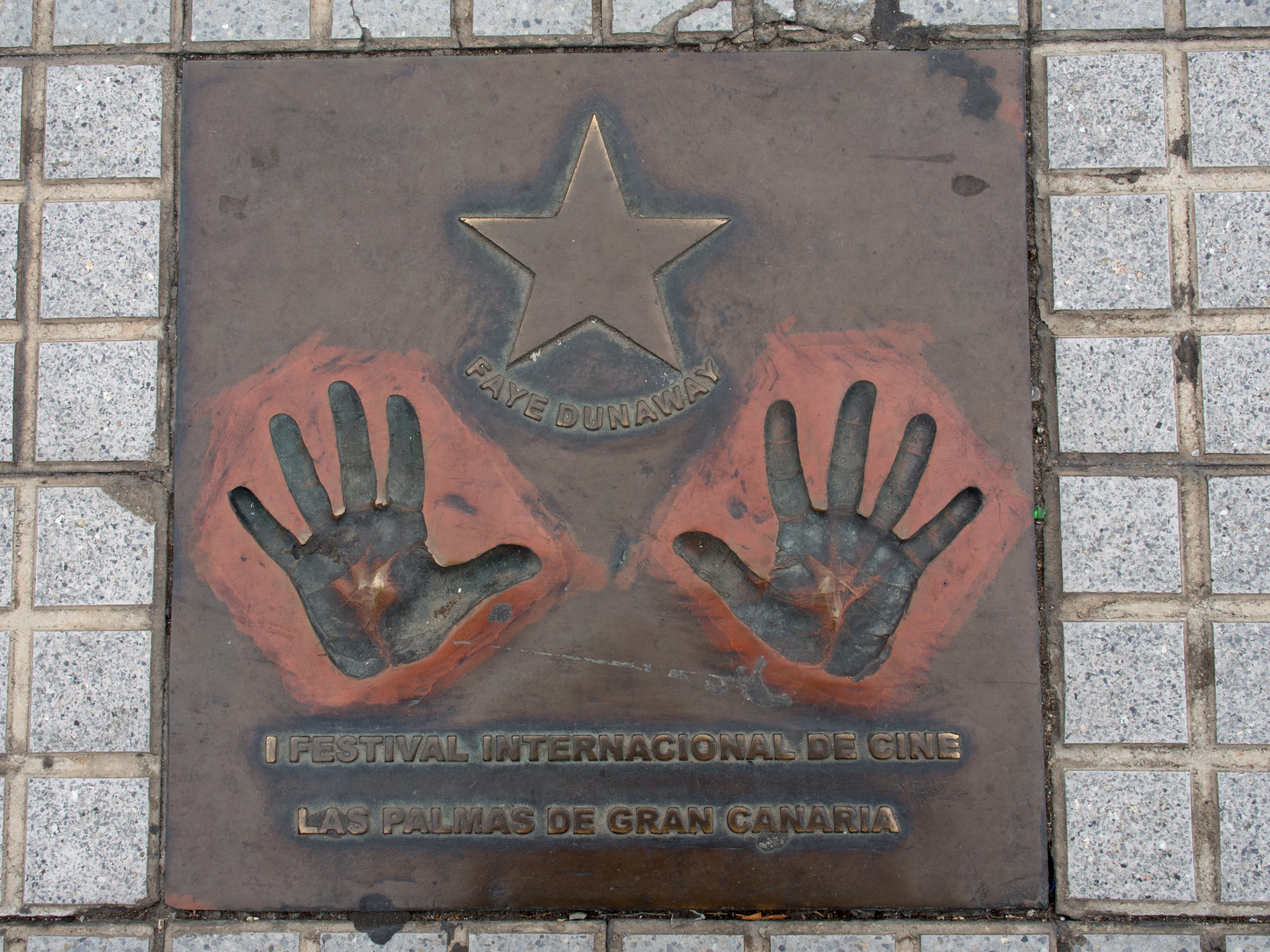 Stern und Handabdruck von Faye Dunaway im Straßenpflaster vor dem Auditorio Alfredo Kraus, Las Palmas (Gran Canaria)